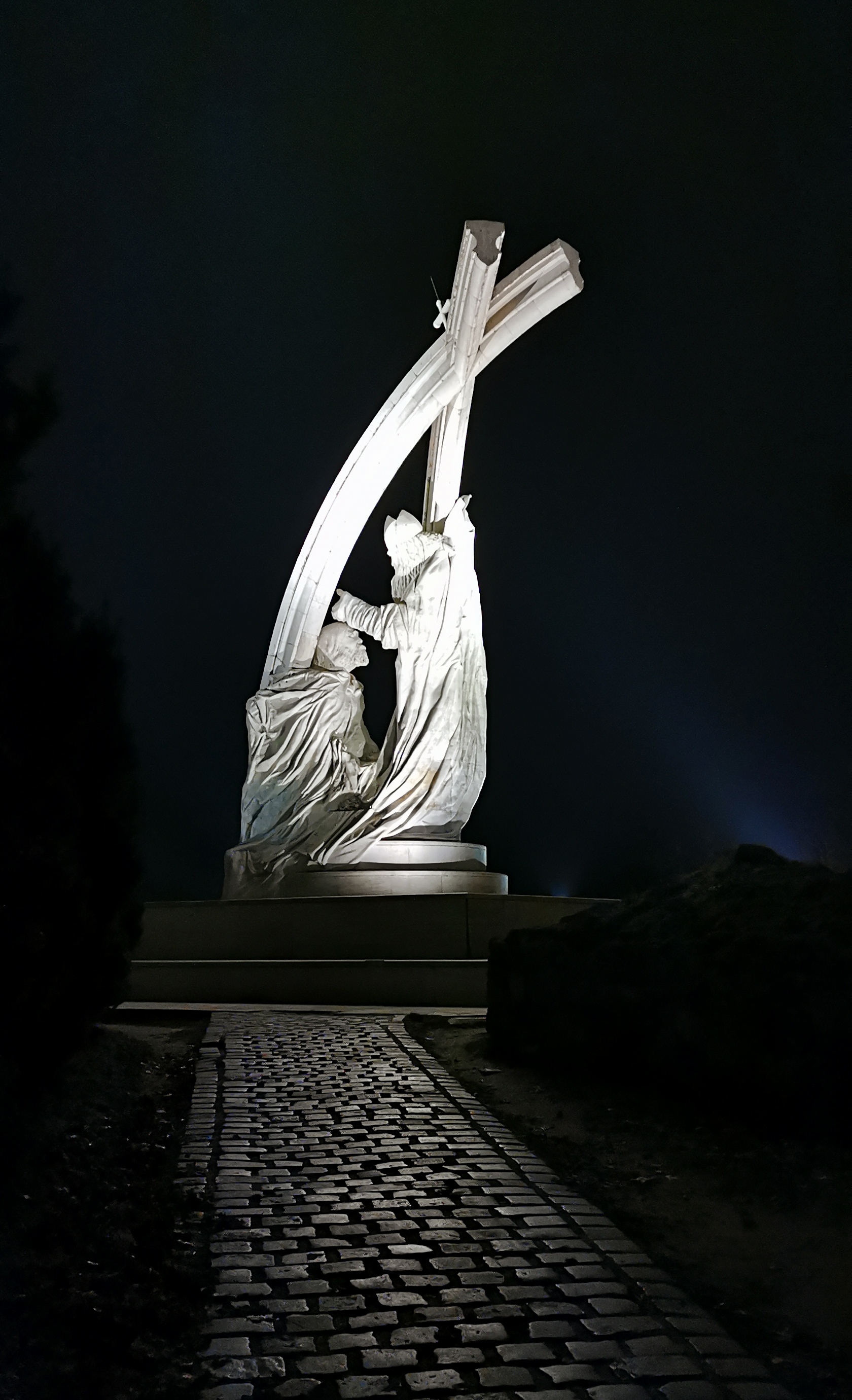 A tizenkét méter magas alkotás felavatása 2001. augusztus 15-én volt.